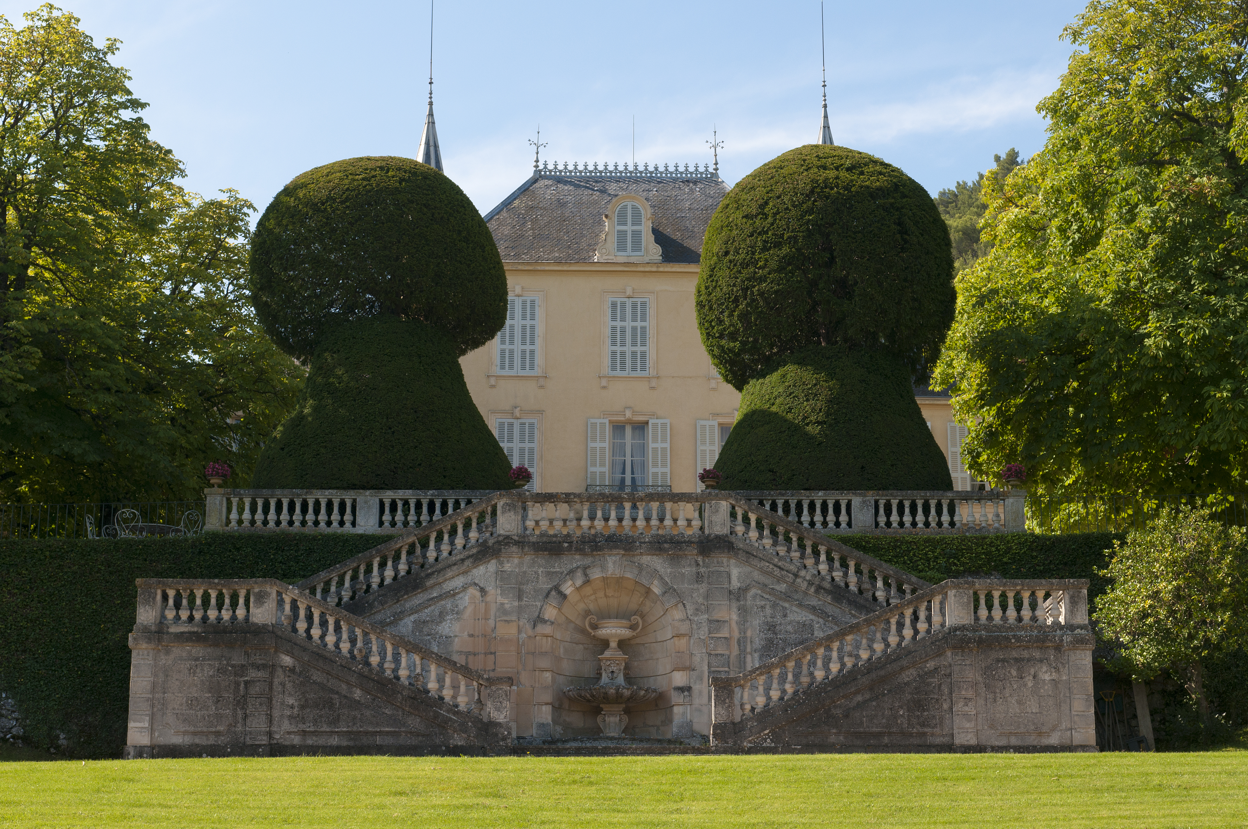 Château Simone, domaine viticole de l'AOC Palette, près d'Aix-en-Provence